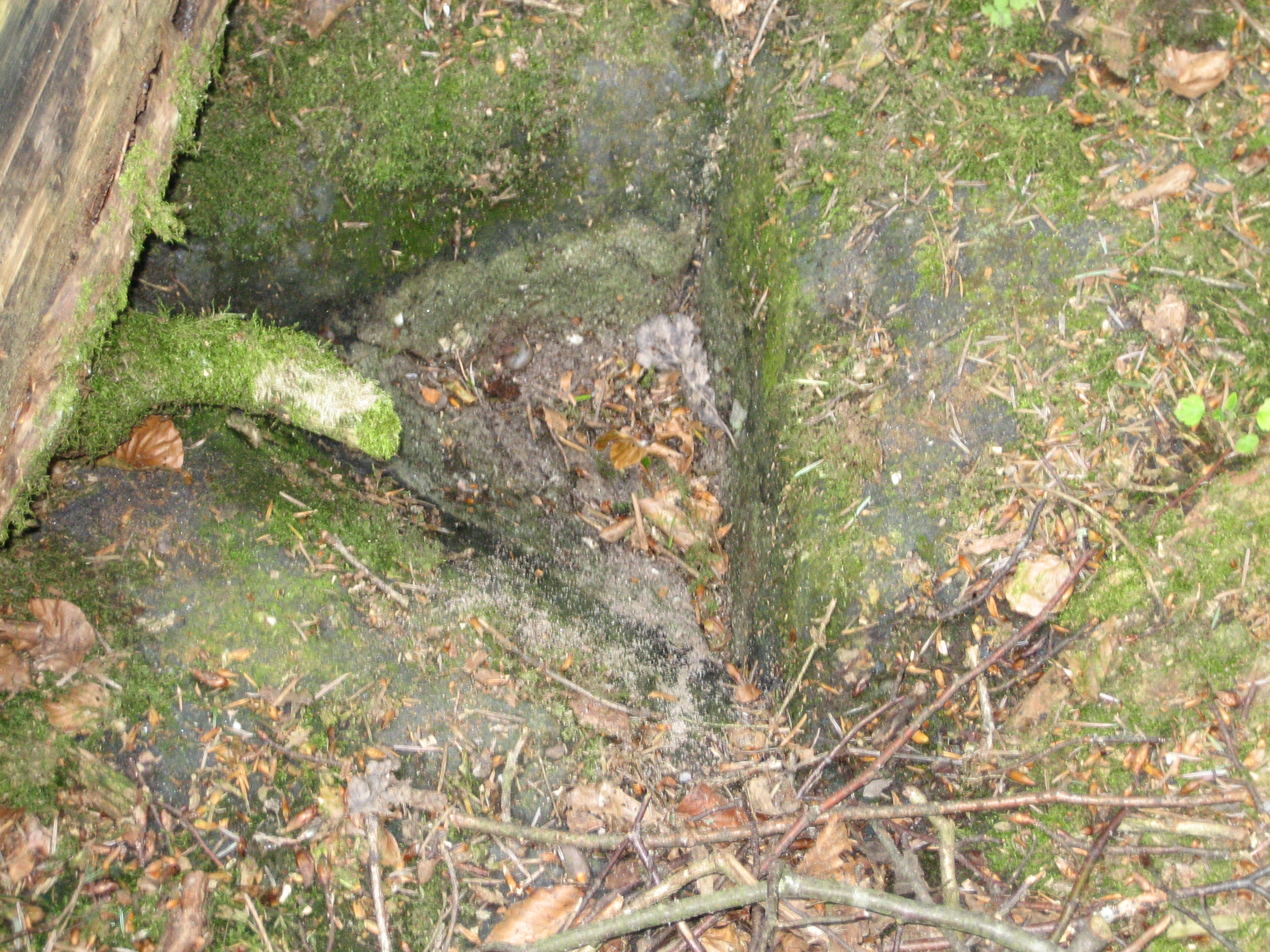 Roche des Gaulois (Deycimont, Vosges, France), by Raphaël Tassin, 2006/07